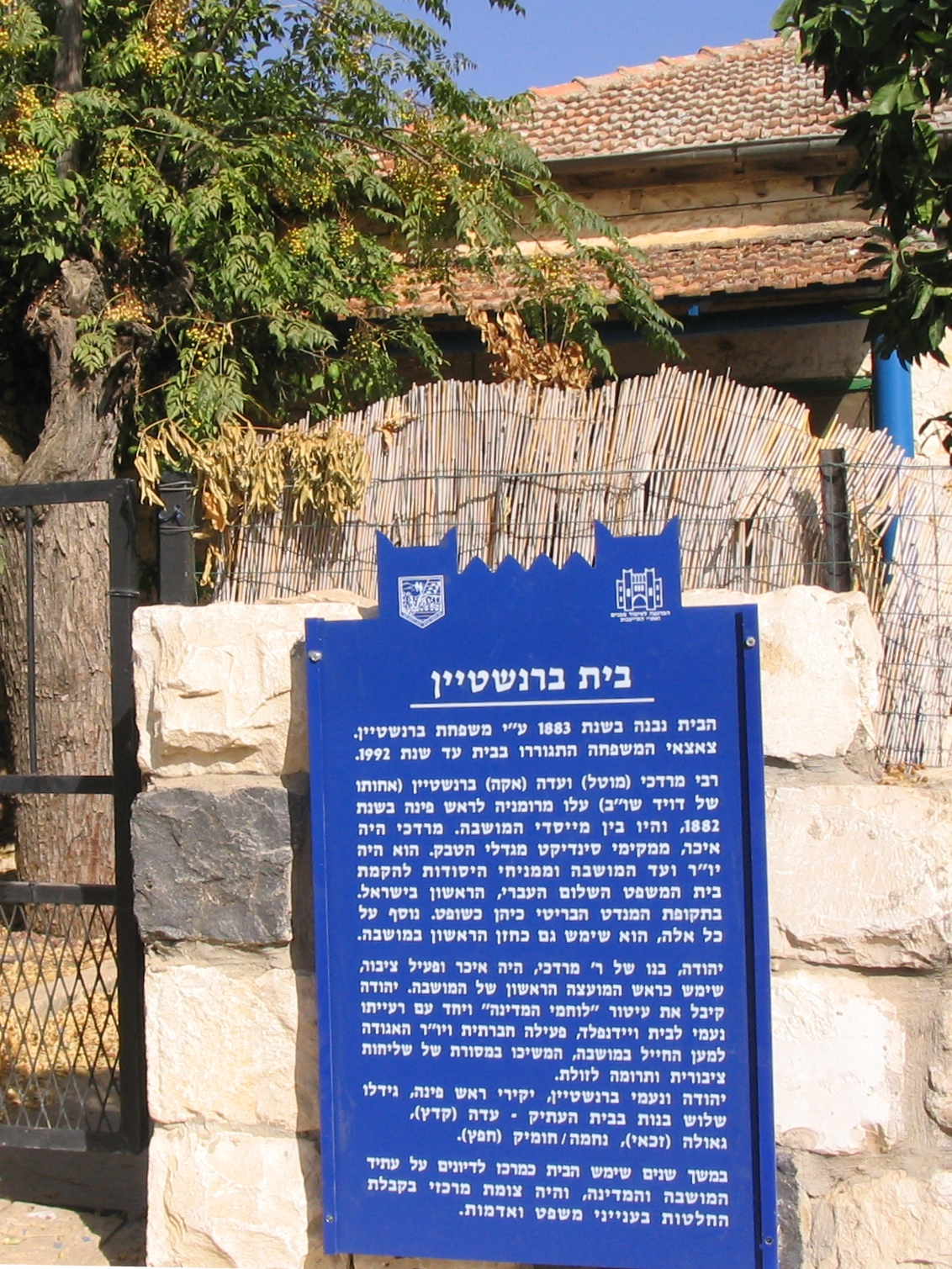 Bernstein house in Rosh Pina